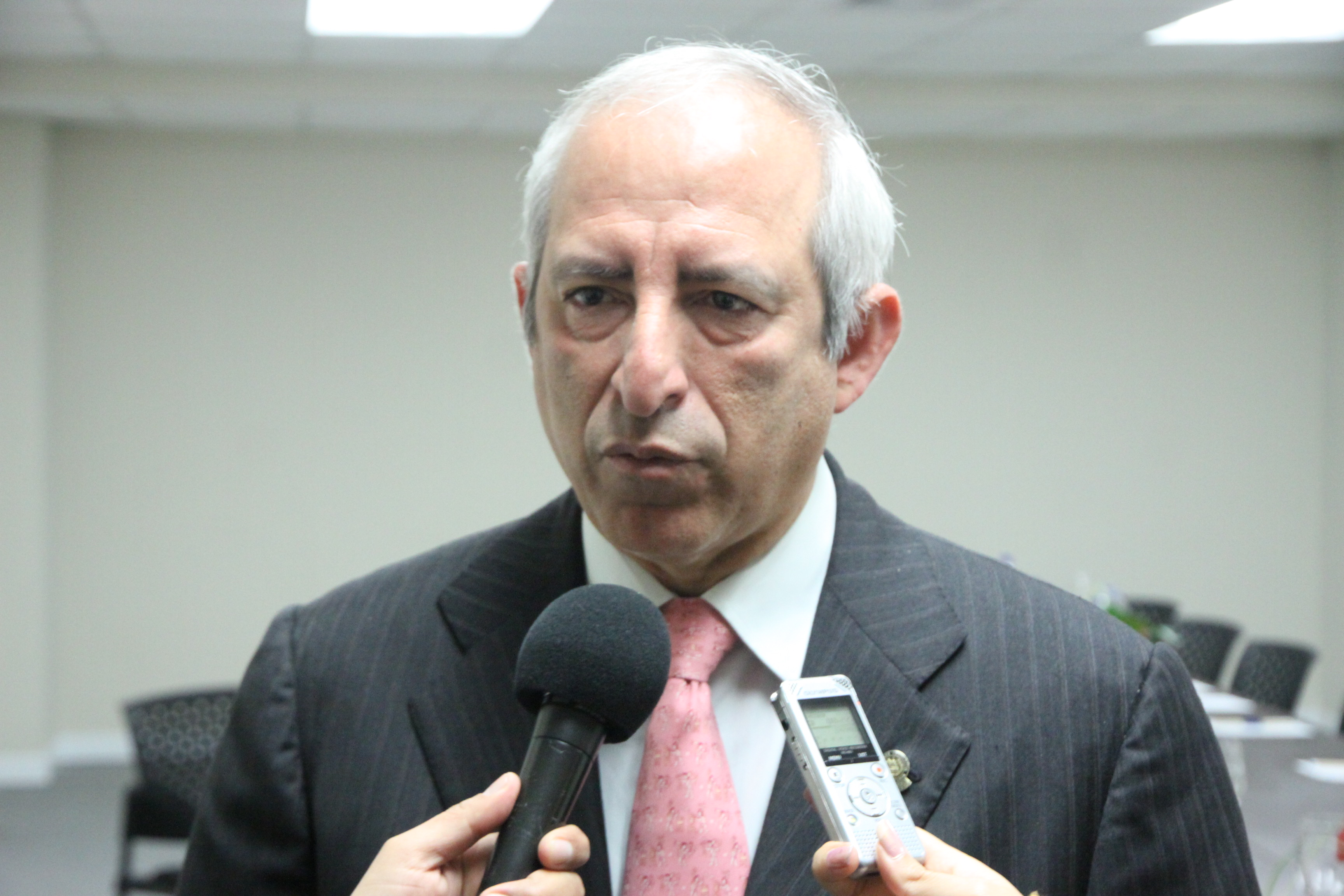 Foto: Hugo Ortiz Ron / Asamblea Nacional